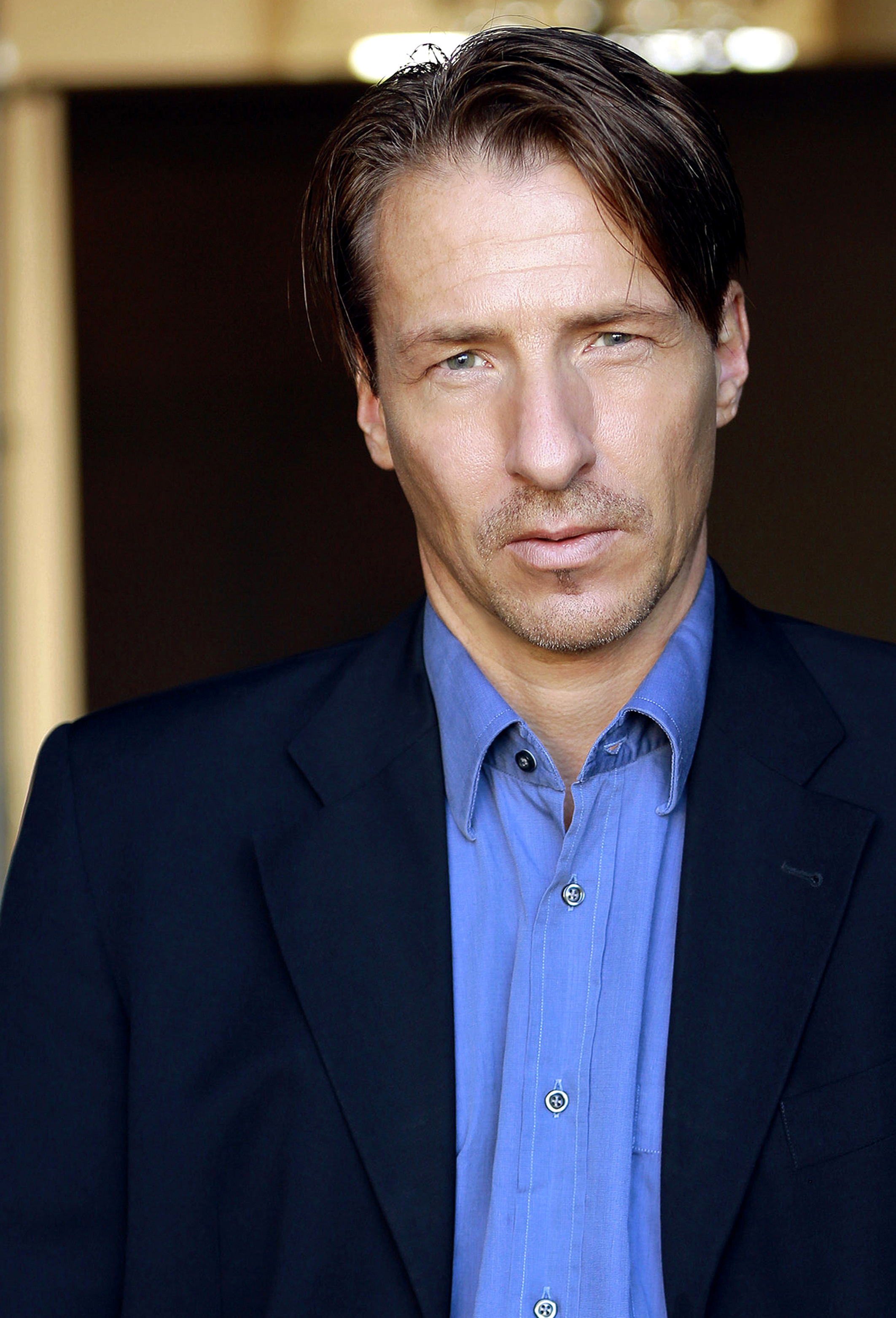 Torsten Kai Holzapfel (*23. August 1970) in Berlin